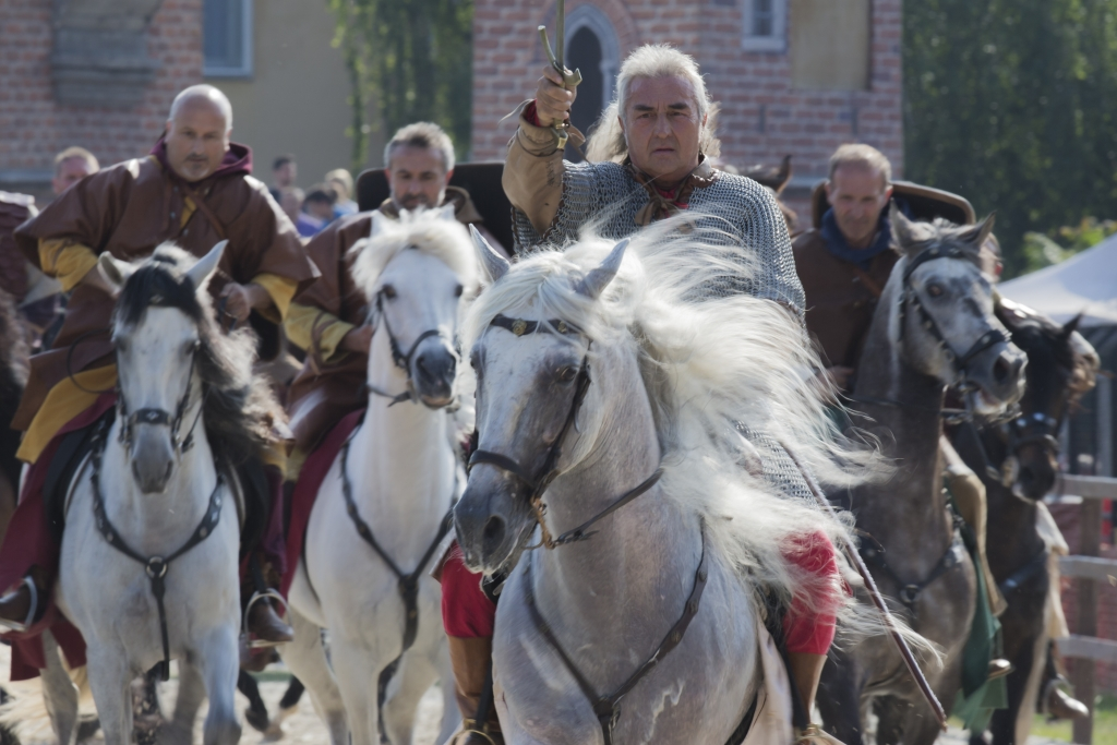 La Compagnia della Morte poco prima di effettuare la carica al Palio di Legnano 2014